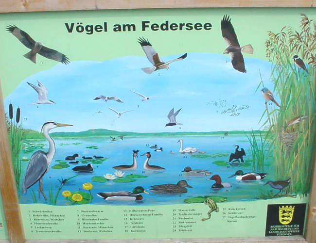 Schautafel zur Vogelwelt am Federsee.